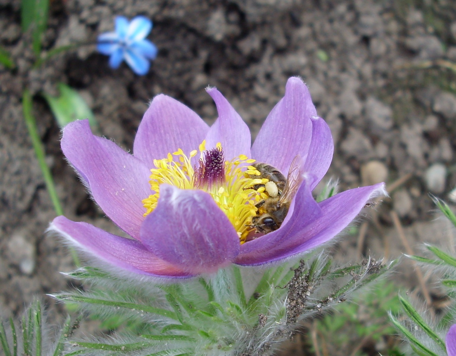 A Bee at work